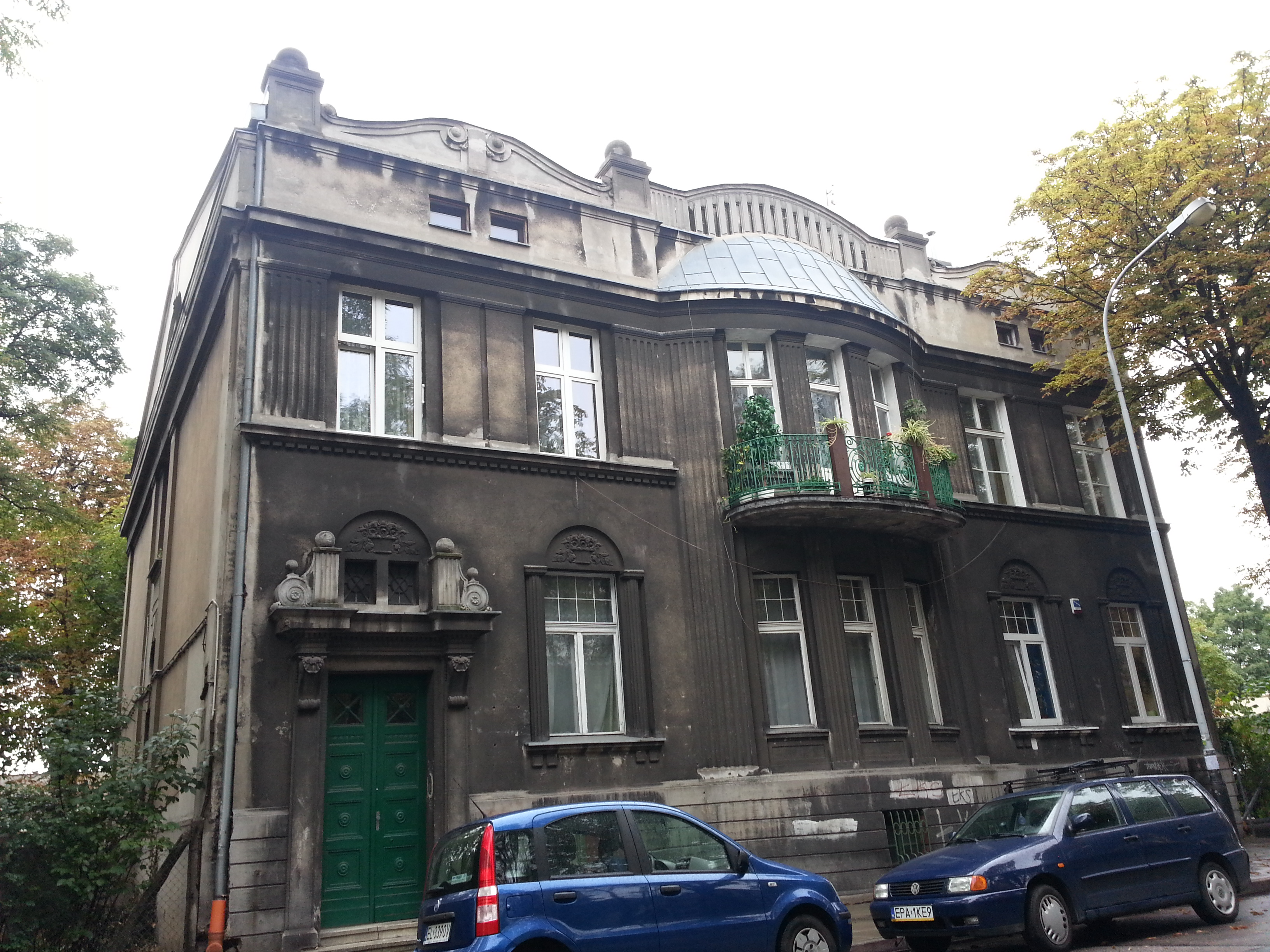 Kamienica przy ul. 28. Pułku Strzelców Kaniowskich w Łodzi - wejście, właściwy adres: ul. 6-ego Sierpnia 61